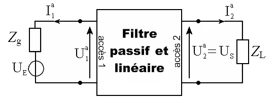 Schéma électrique explicatif.